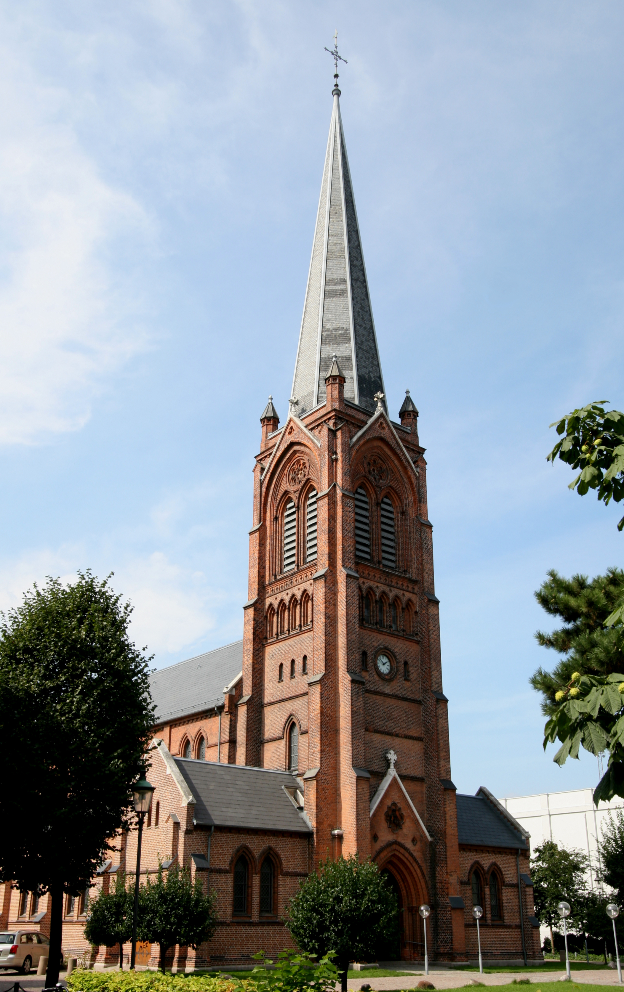 Sankt Jakobs Kirke in Copenhagen, Denmark.